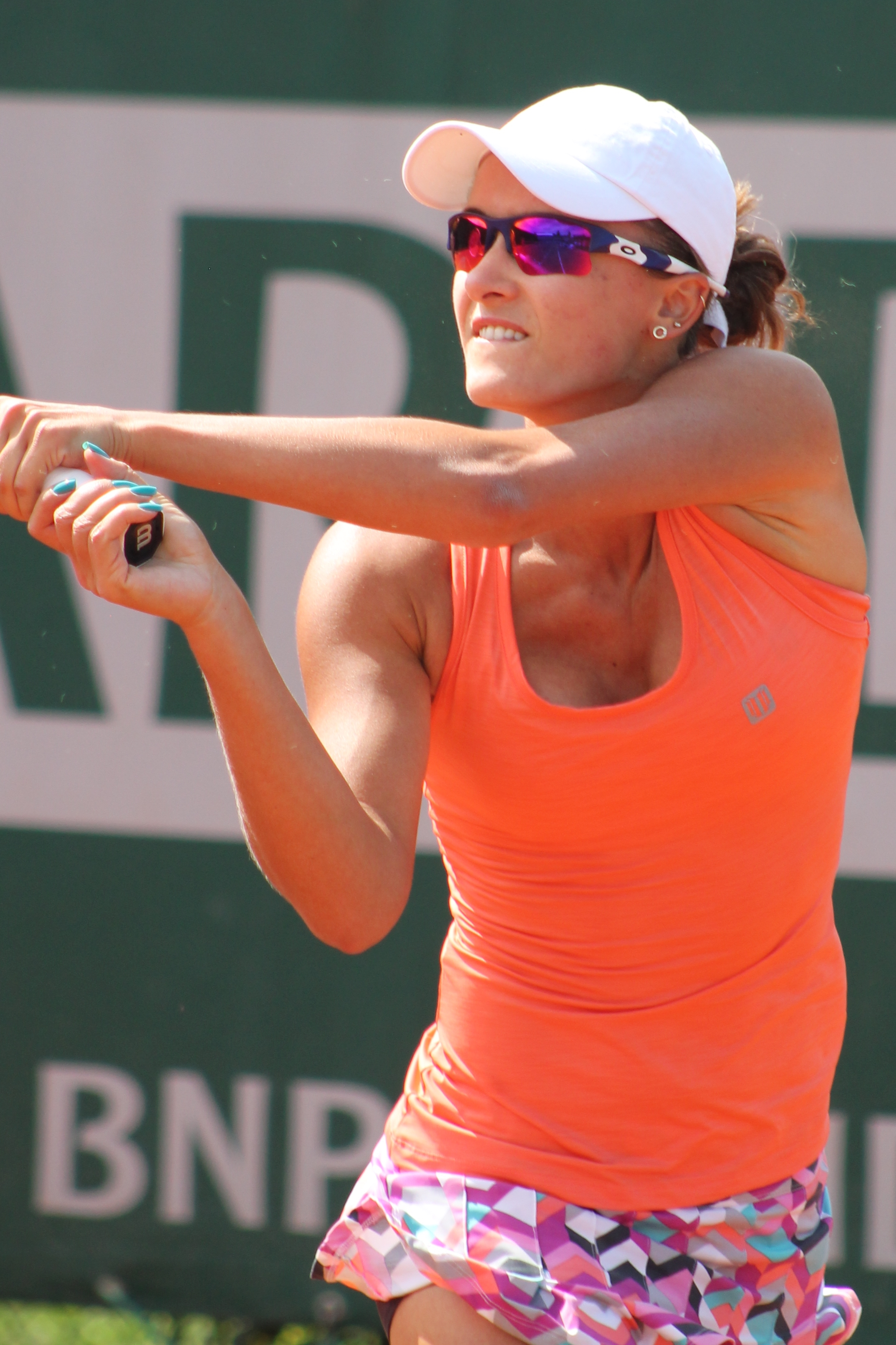 Arina Rodionova RG15 (16)